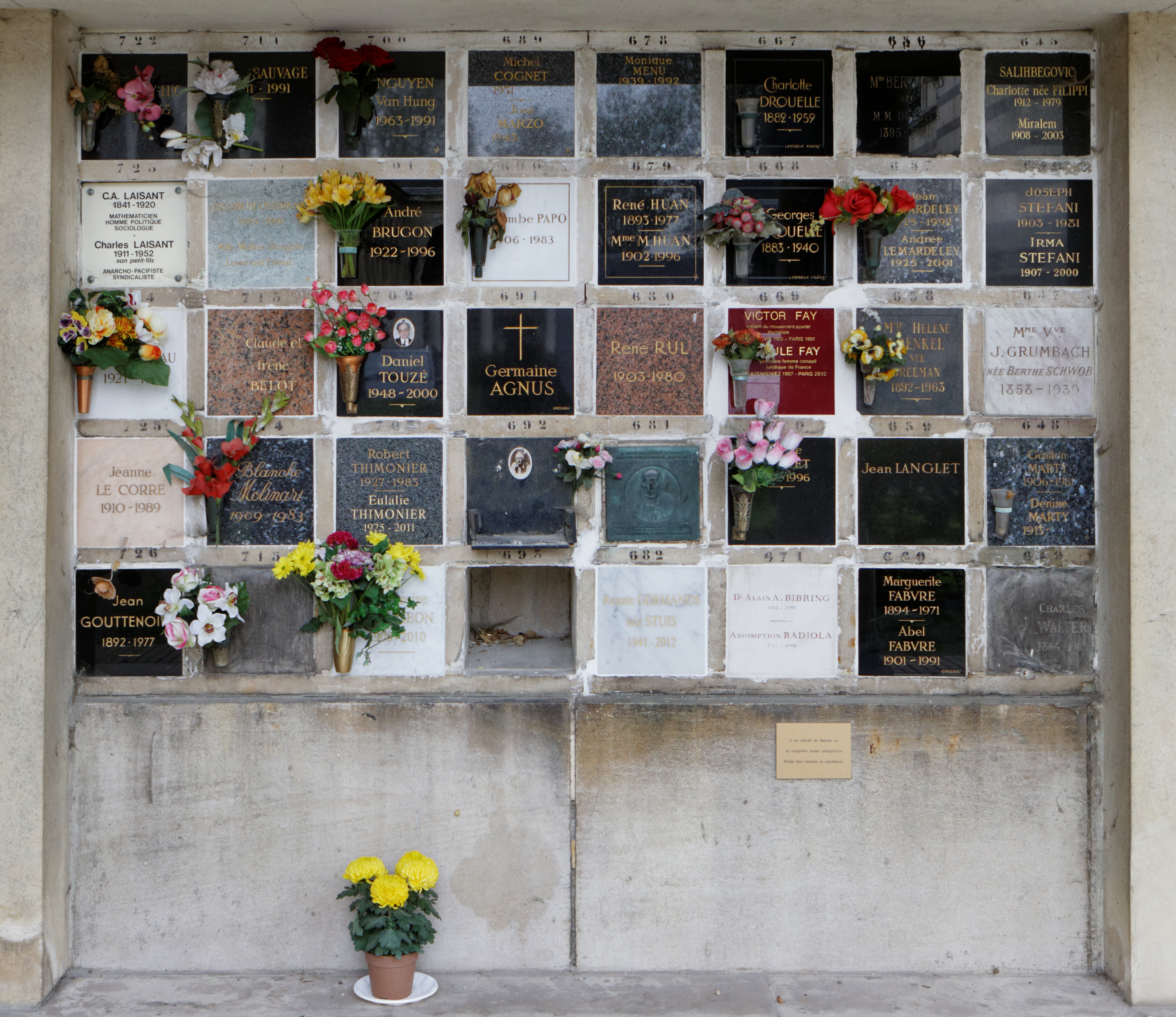 Cases du columbarium du cimetière du Père-Lachaise.